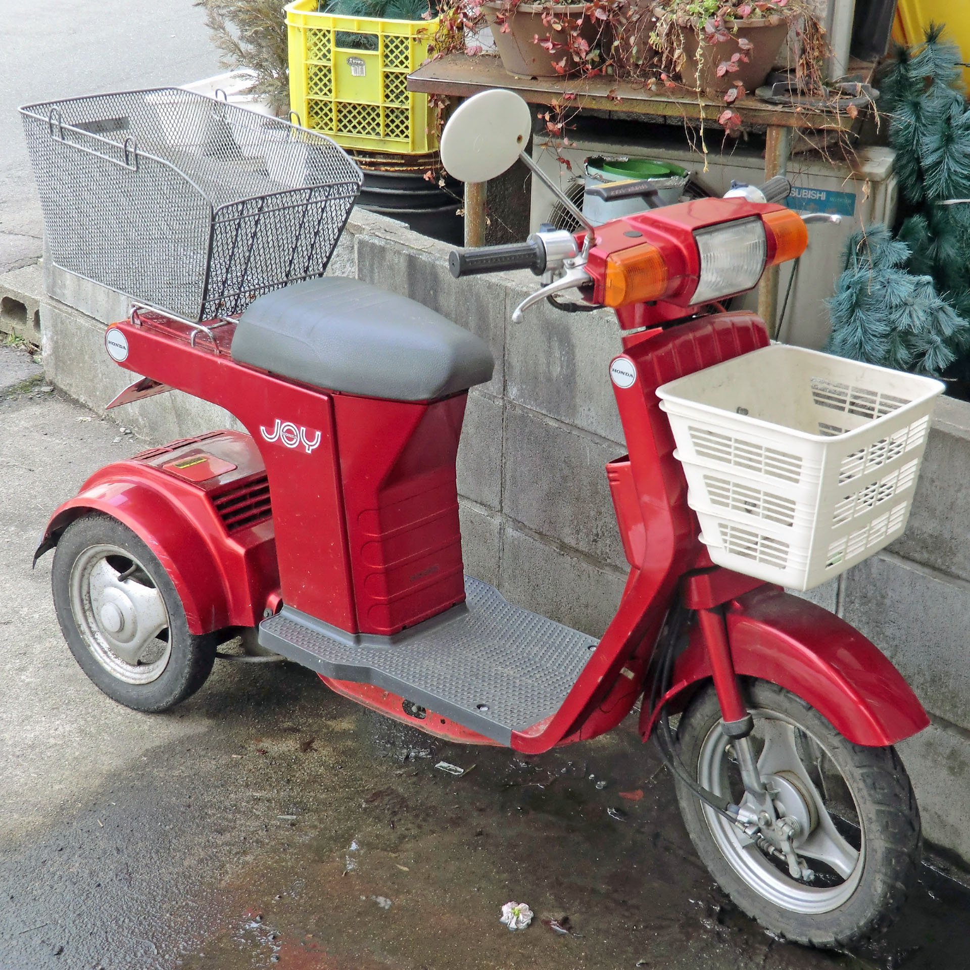 Honda Joy